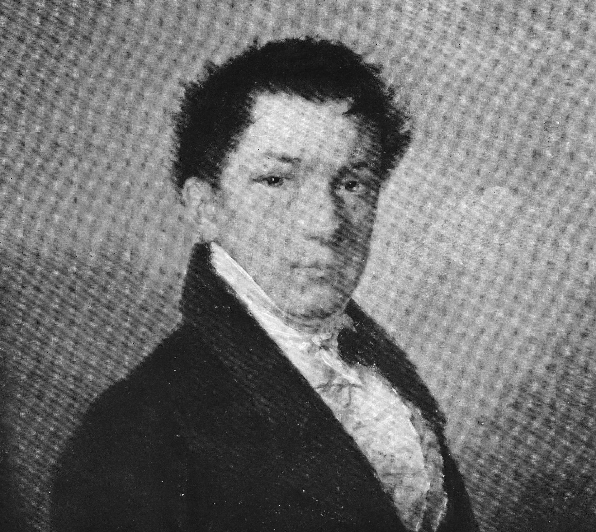 Bildnis (Ausschnitt) Georg Emanuel Ludwig Ziegler (1807-1867)